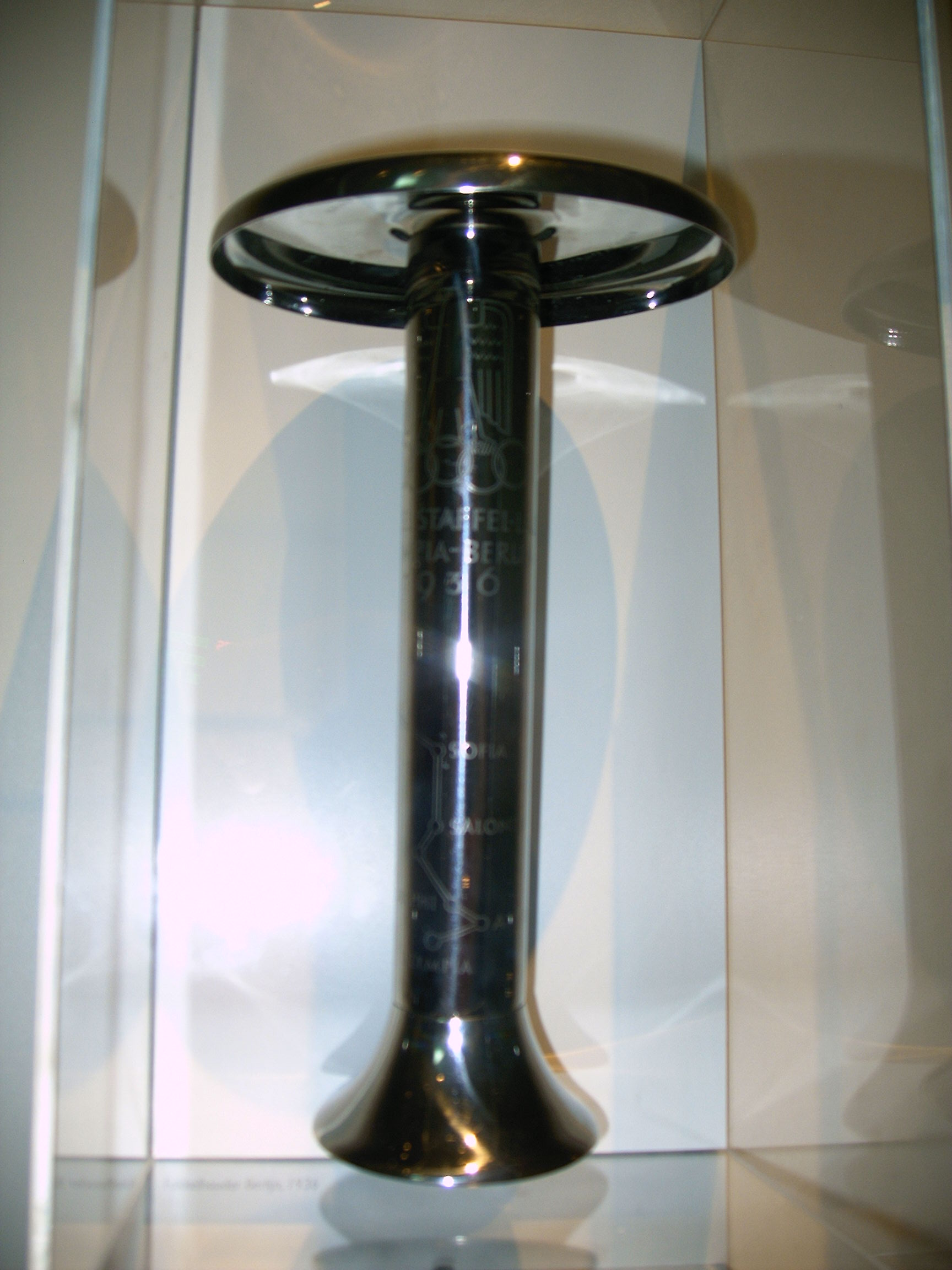 Olympische fakkel van de spelen in 1936 berlijn